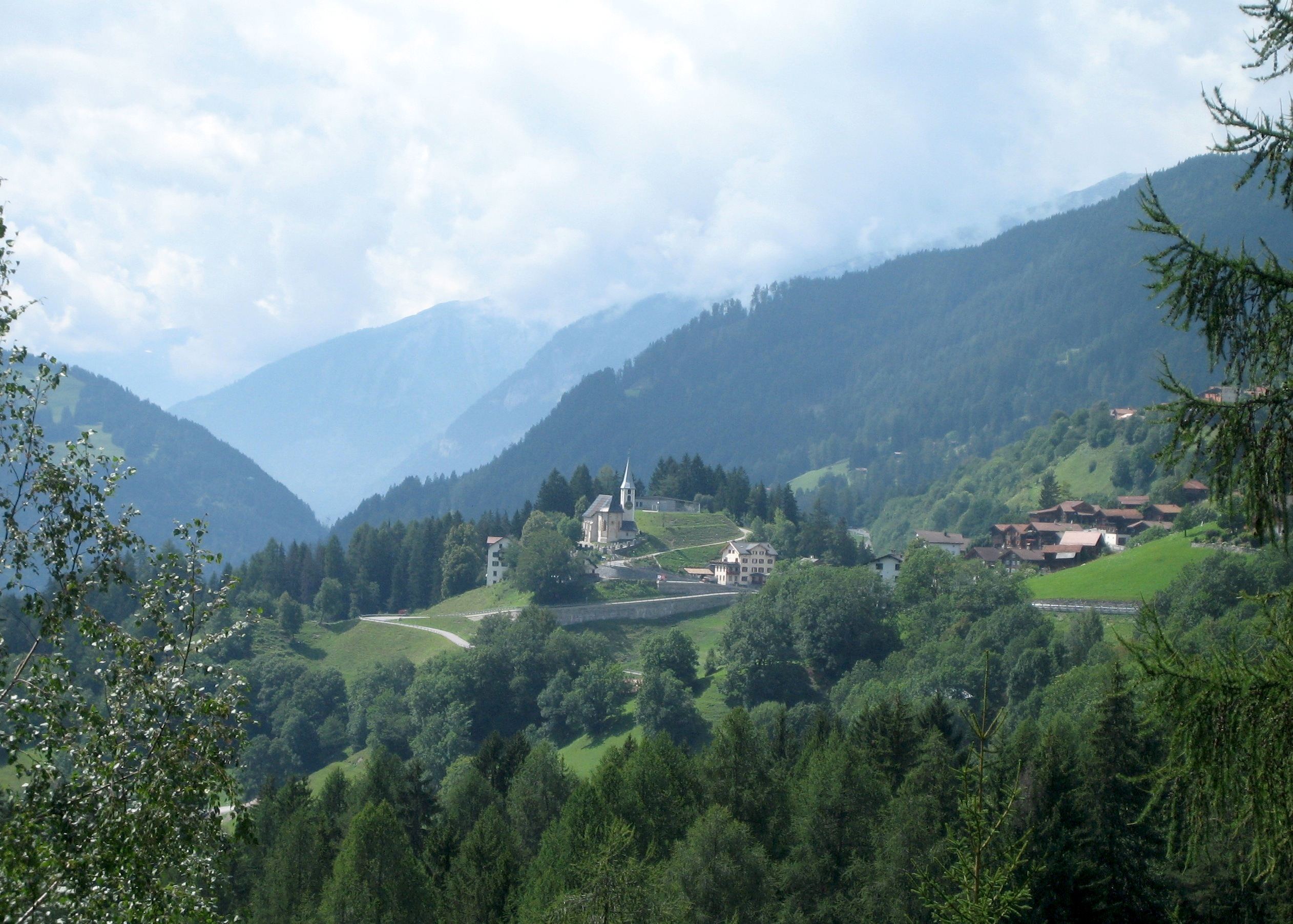 Castiel